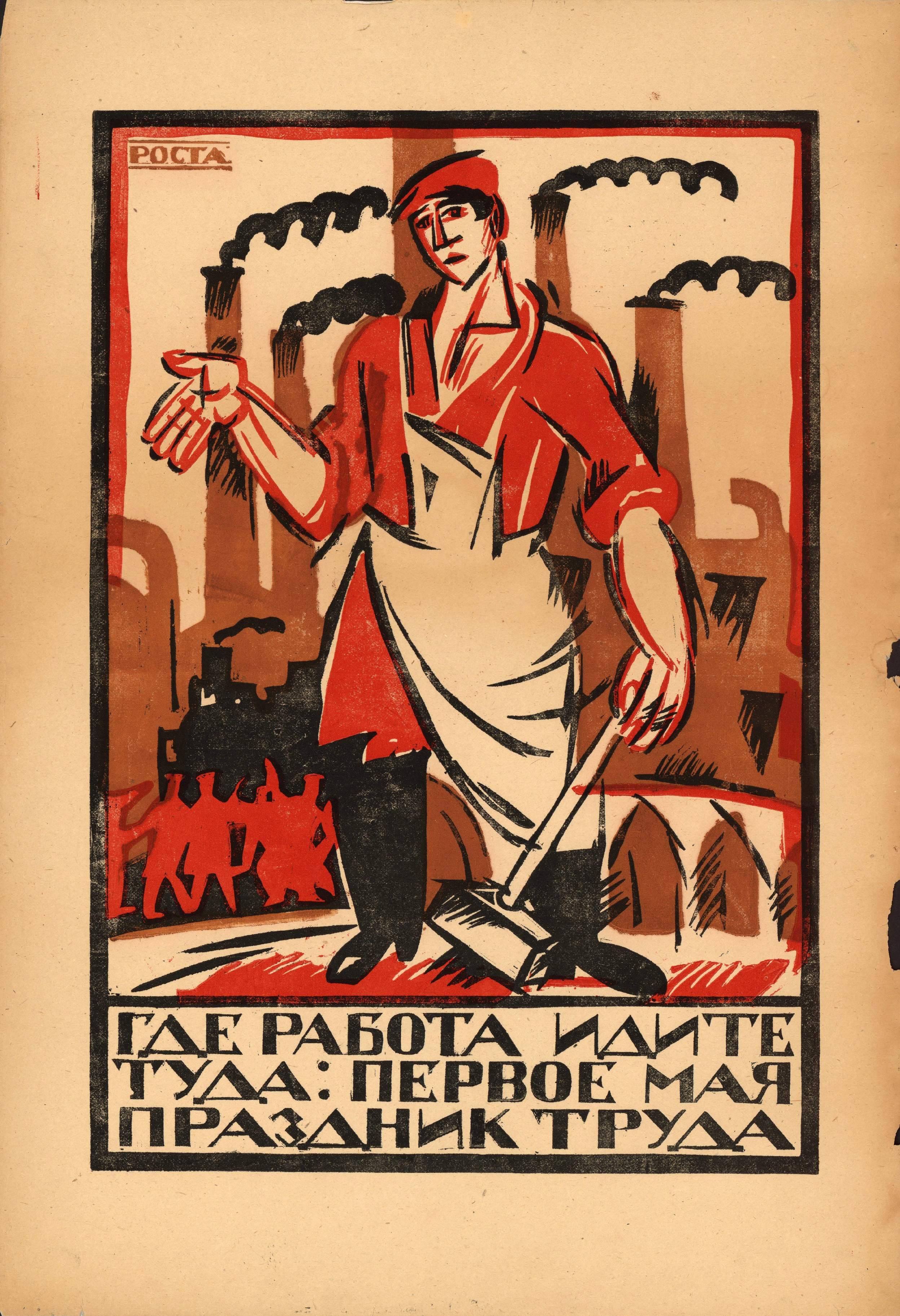 Где работа, идите туда: первое мая — праздник труда : [плакат] / [В. В. Маяковский] ; худож. [И. А. Малютин]. — [Москва] : РОСТА, [1920]. — Цветная литография, 1 лист, 65 × 44,5 см.